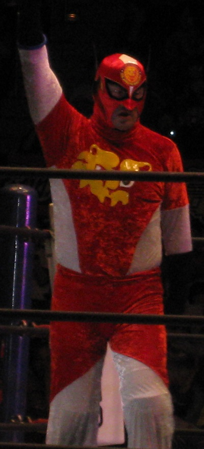 9月29日 神戸大会 「DESTRUCTION」 キャプテン・ニュージャパン